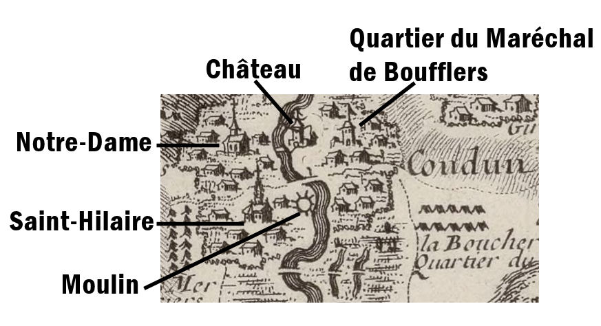 Extrait de la carte du Camp de Coudun dressée par Pennier - Doc BnF